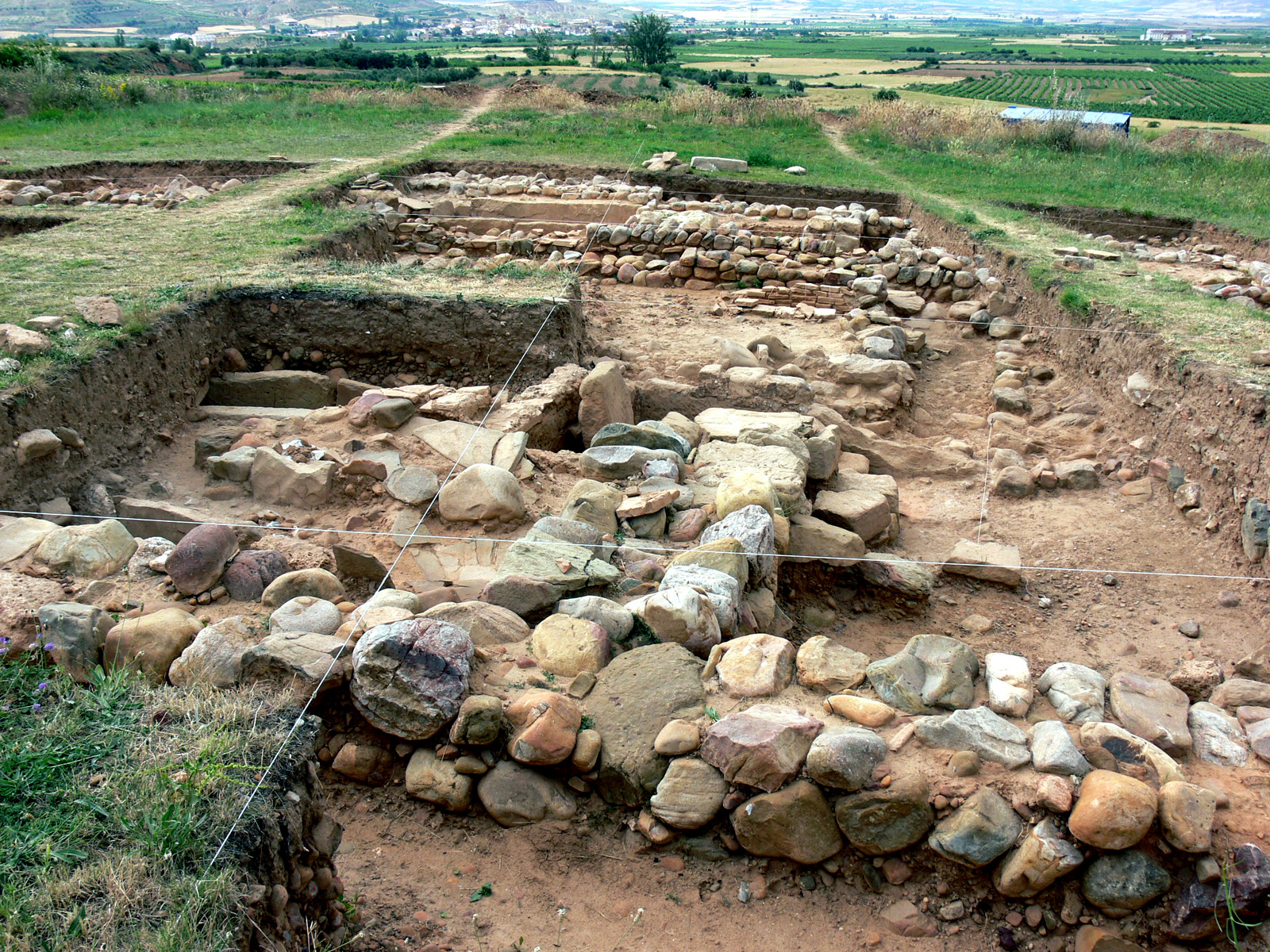 Restos arqueológicos de Parpalinas en Pipaona, aldea de Ocón (La Rioja - España)